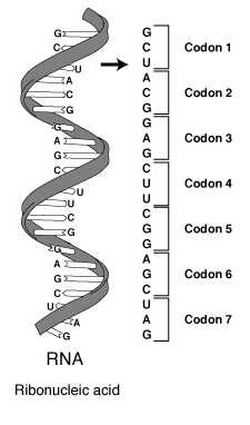 在RNA分子上一系列的密碼子，每個密碼子包括三個核苷酸，代表一個氨基酸。.